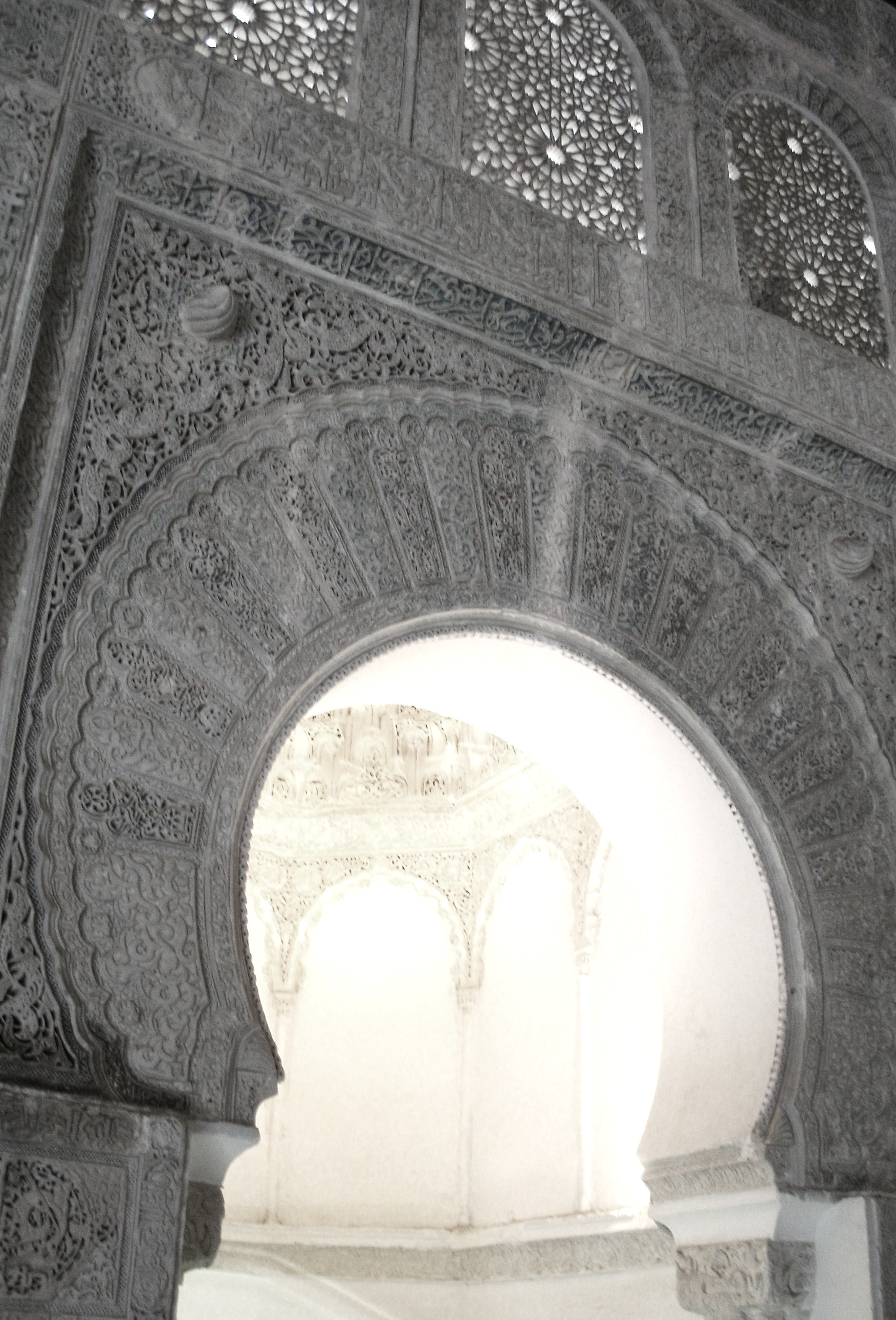 Les stucs du mihrab de la mosquée Sidi Belhassen à Tlemcen